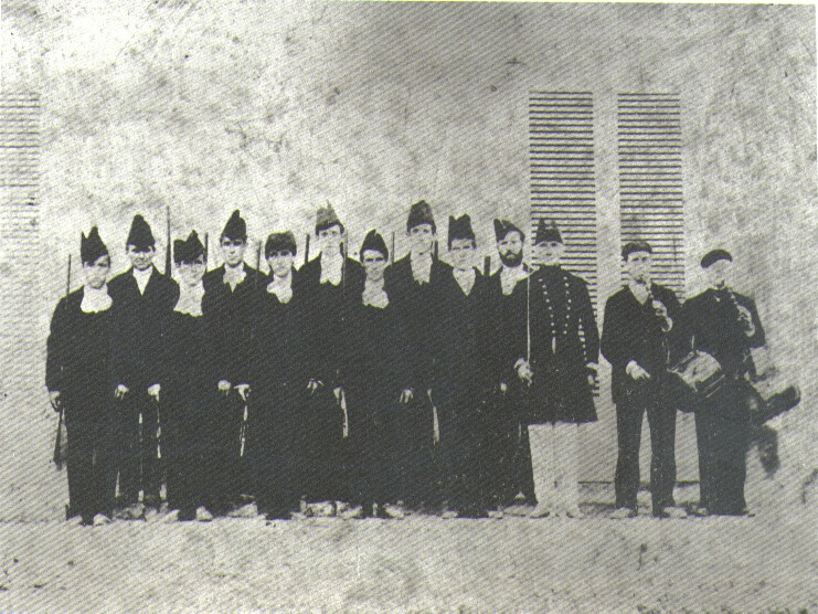 Elorrioko Errebonbilloak, 1900. urtean